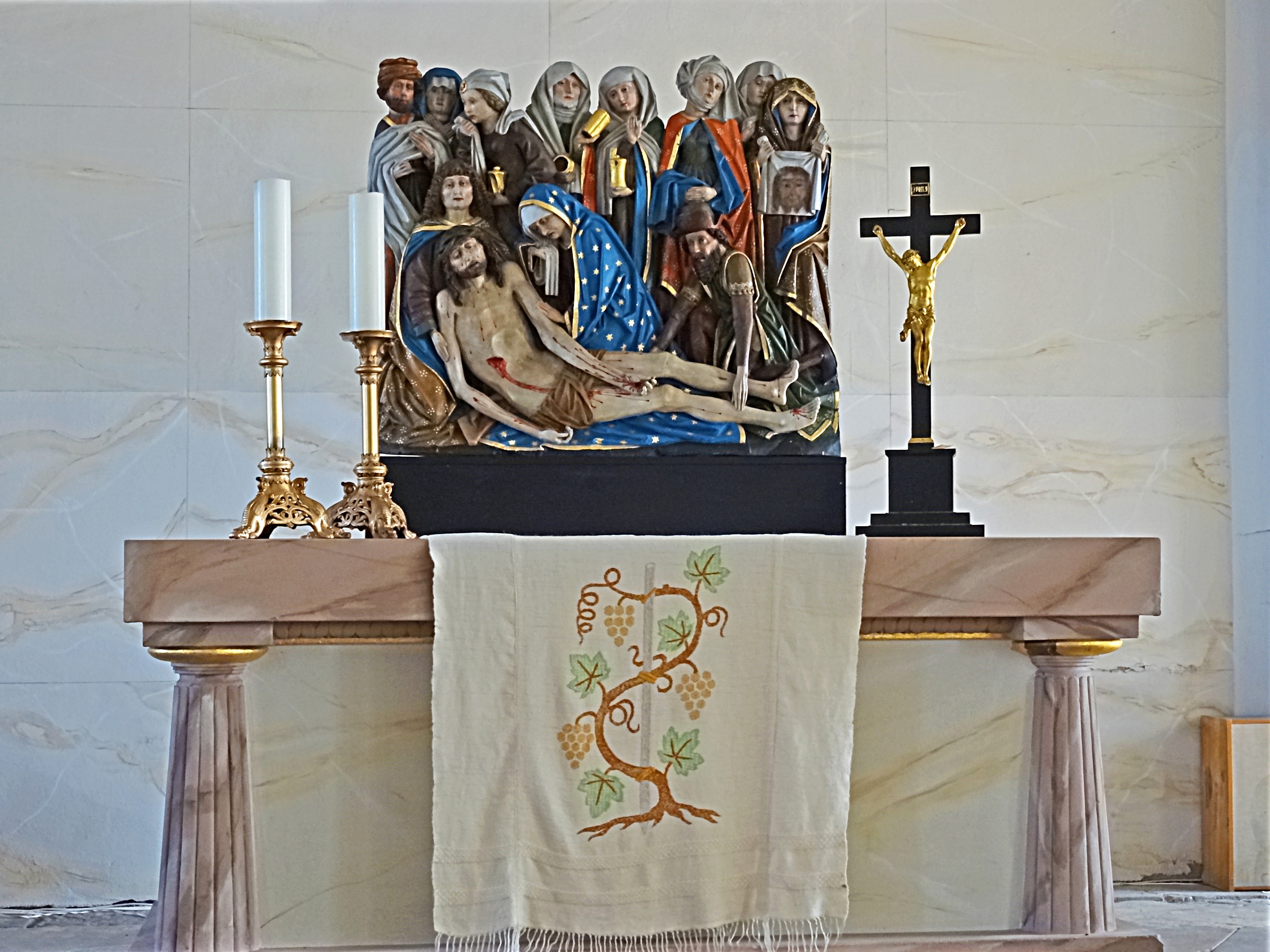 Kirche zu Gräfinau-Angstedt, Figurengruppe Beweinung Jesu aus einer Saalfelder Werkstatt